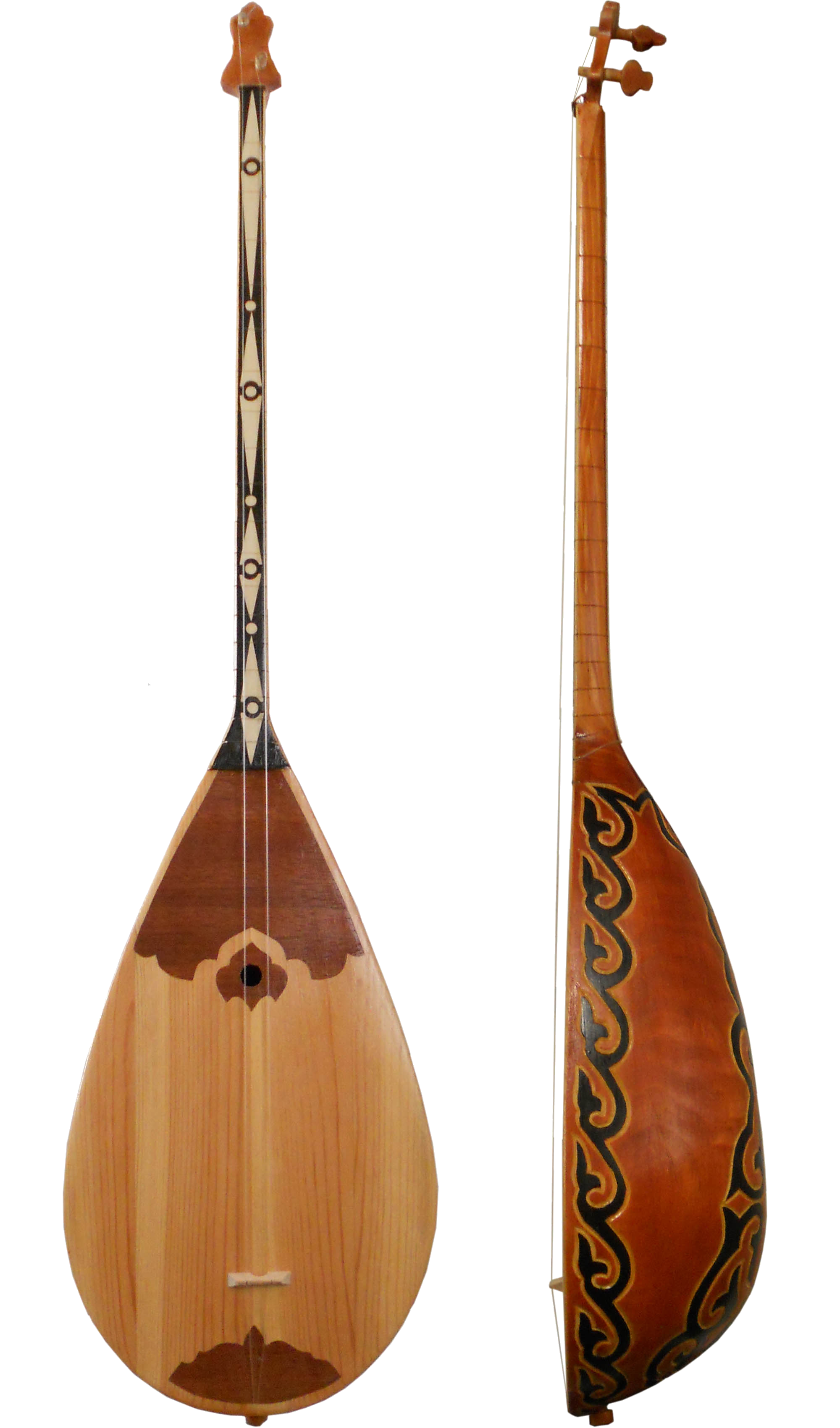 Казахская домбра.